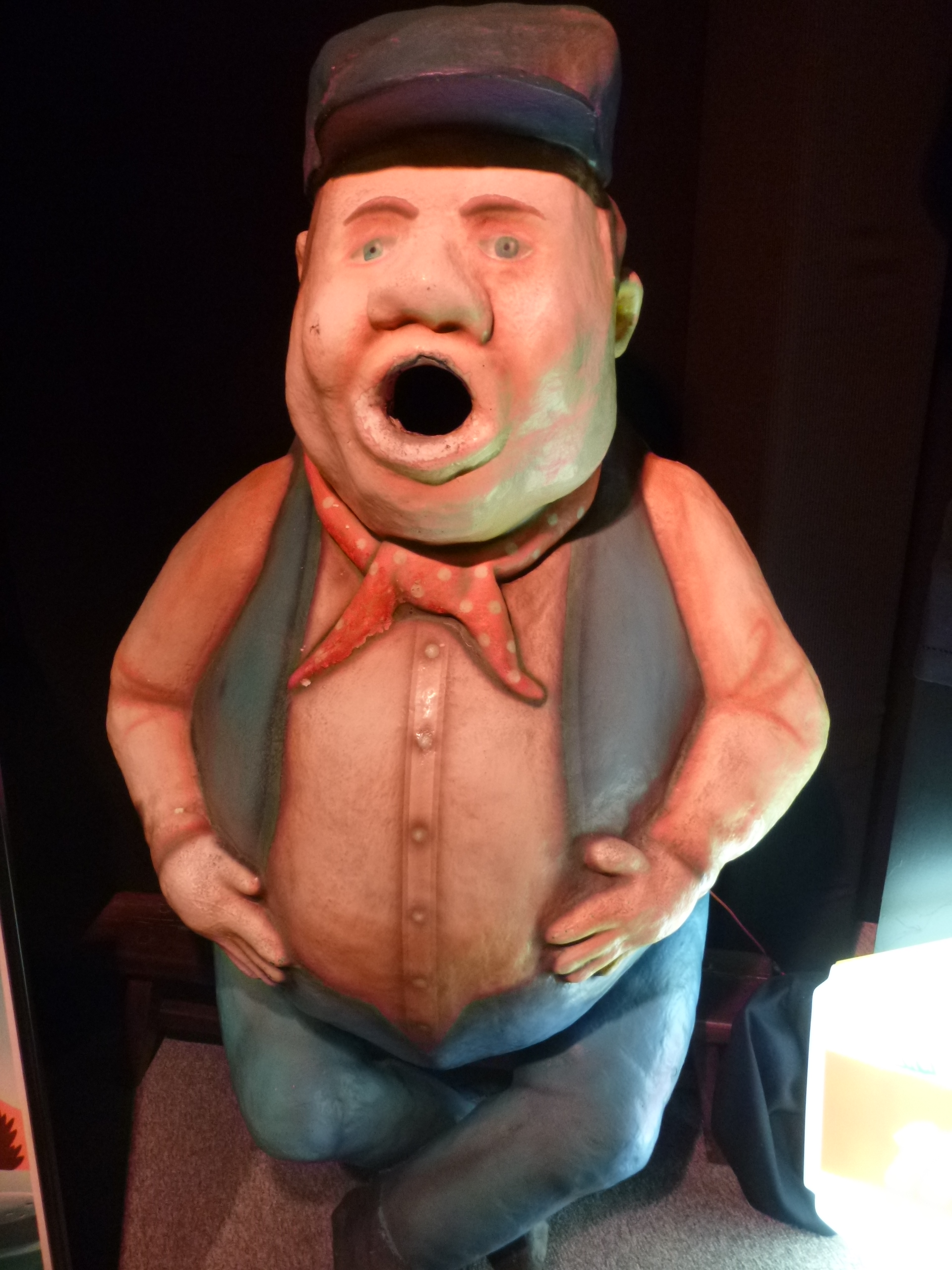 Poubelle mangeur de papiers à l'exposition Meli Park